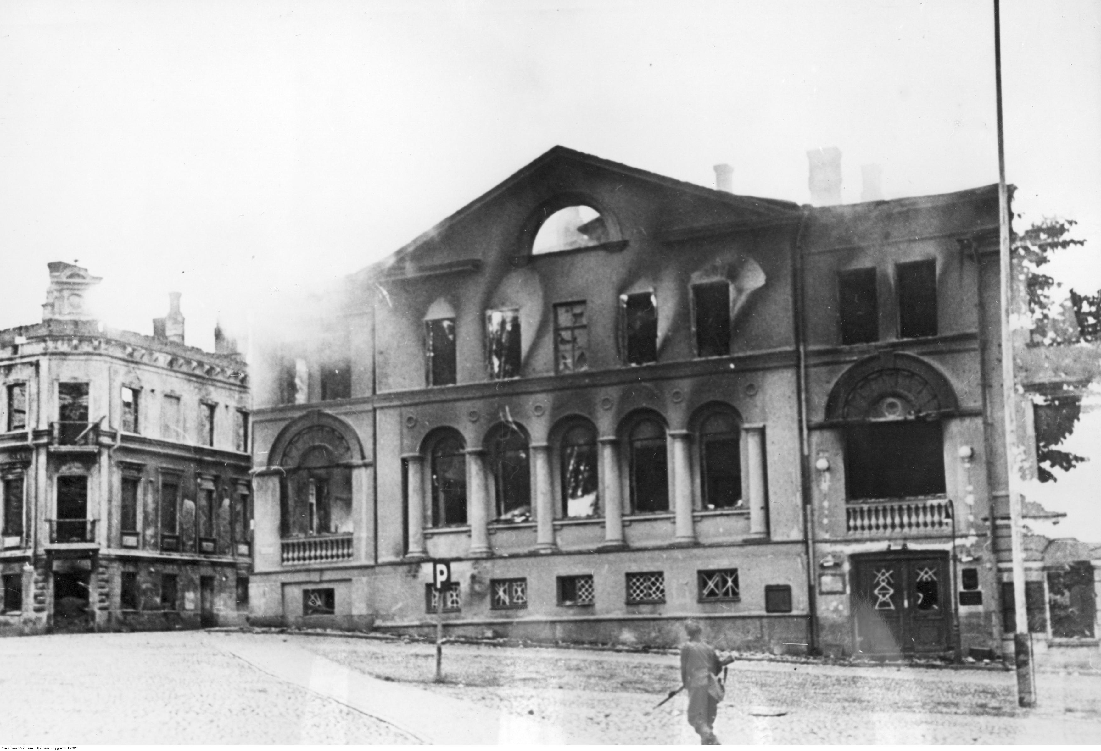 Wyborg. Zniszczony teatr miejski.